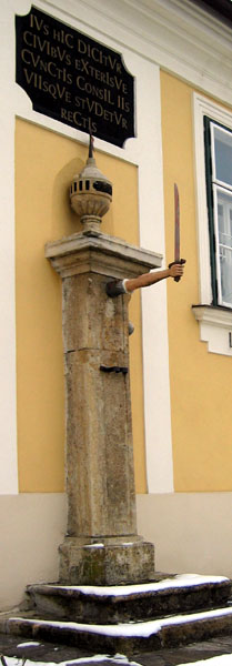 Pranger in Pinkafeld am Rindsmaul`schen Gutshaus – dem heutigen Stadtmuseum, Burgenland, Austria